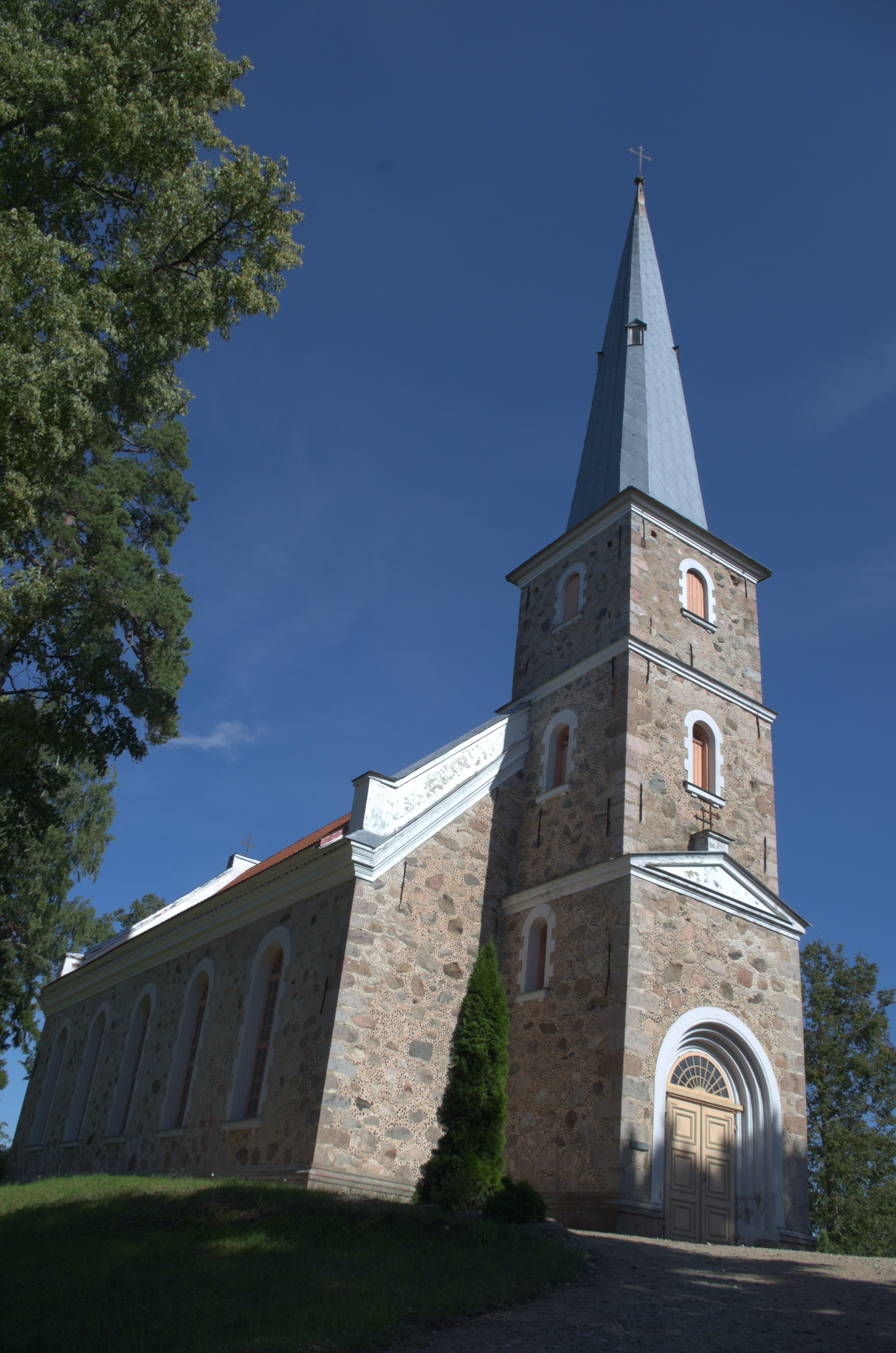 Mazirbe kirik